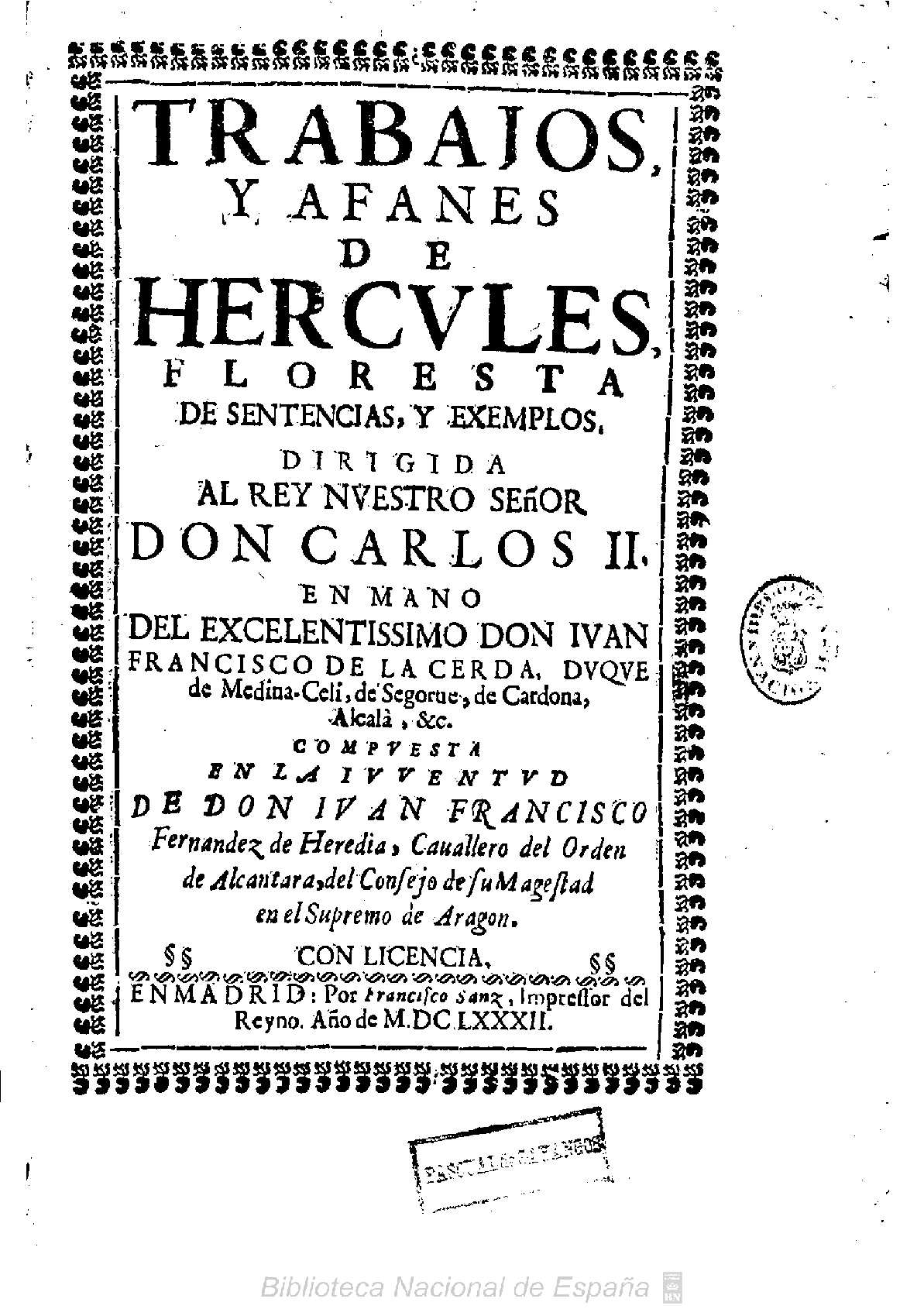 Trabajos y afanes de Hercules ... en la iuventud de don Iuan Francisco Fernandez de Heredia ... Autor: Fernández de Heredia, Juan Francisco Fecha: 1682 Datos de edición: En Madrid por Francisco Sanz ...